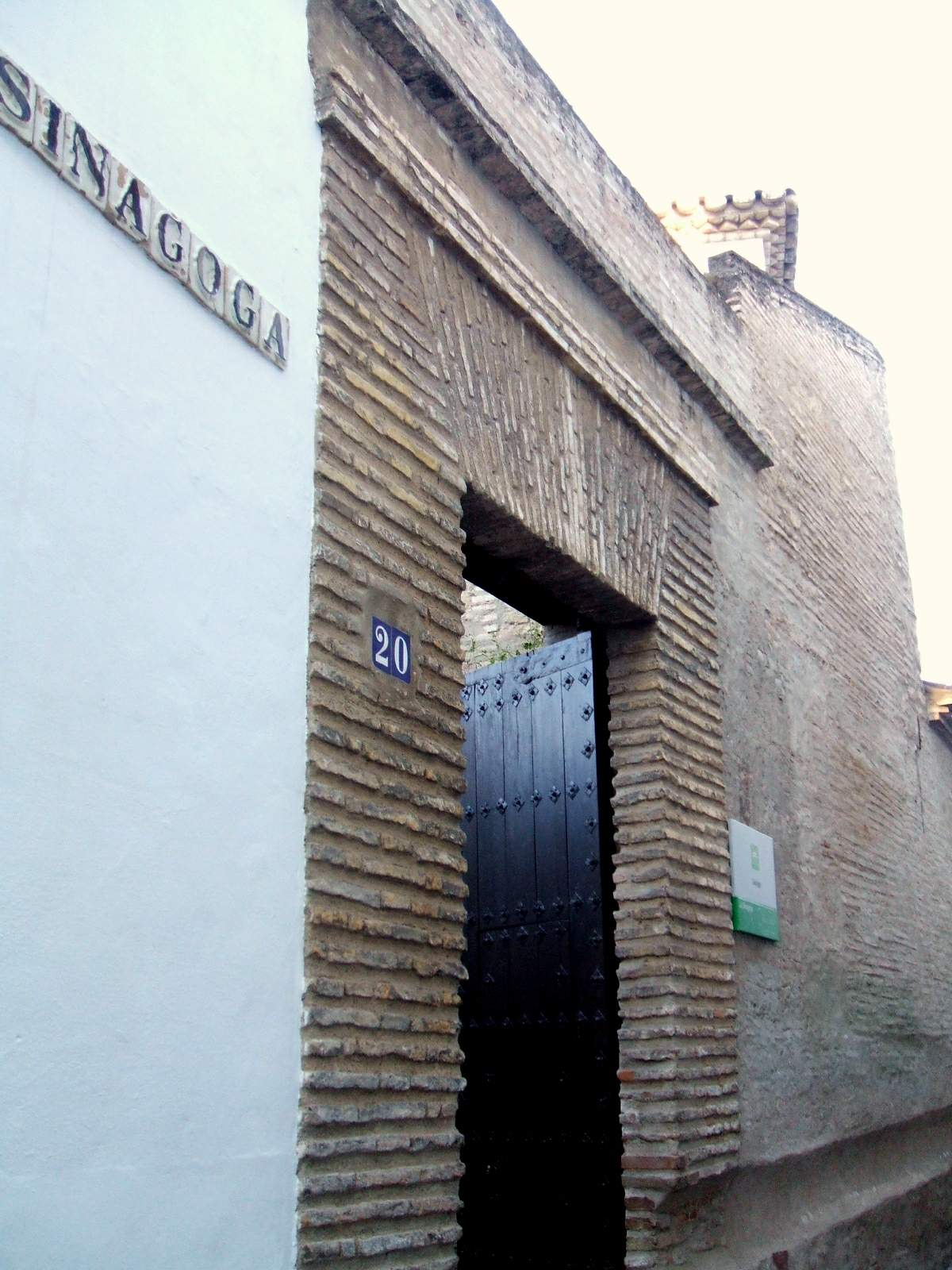 Sinagoga de Córdoba